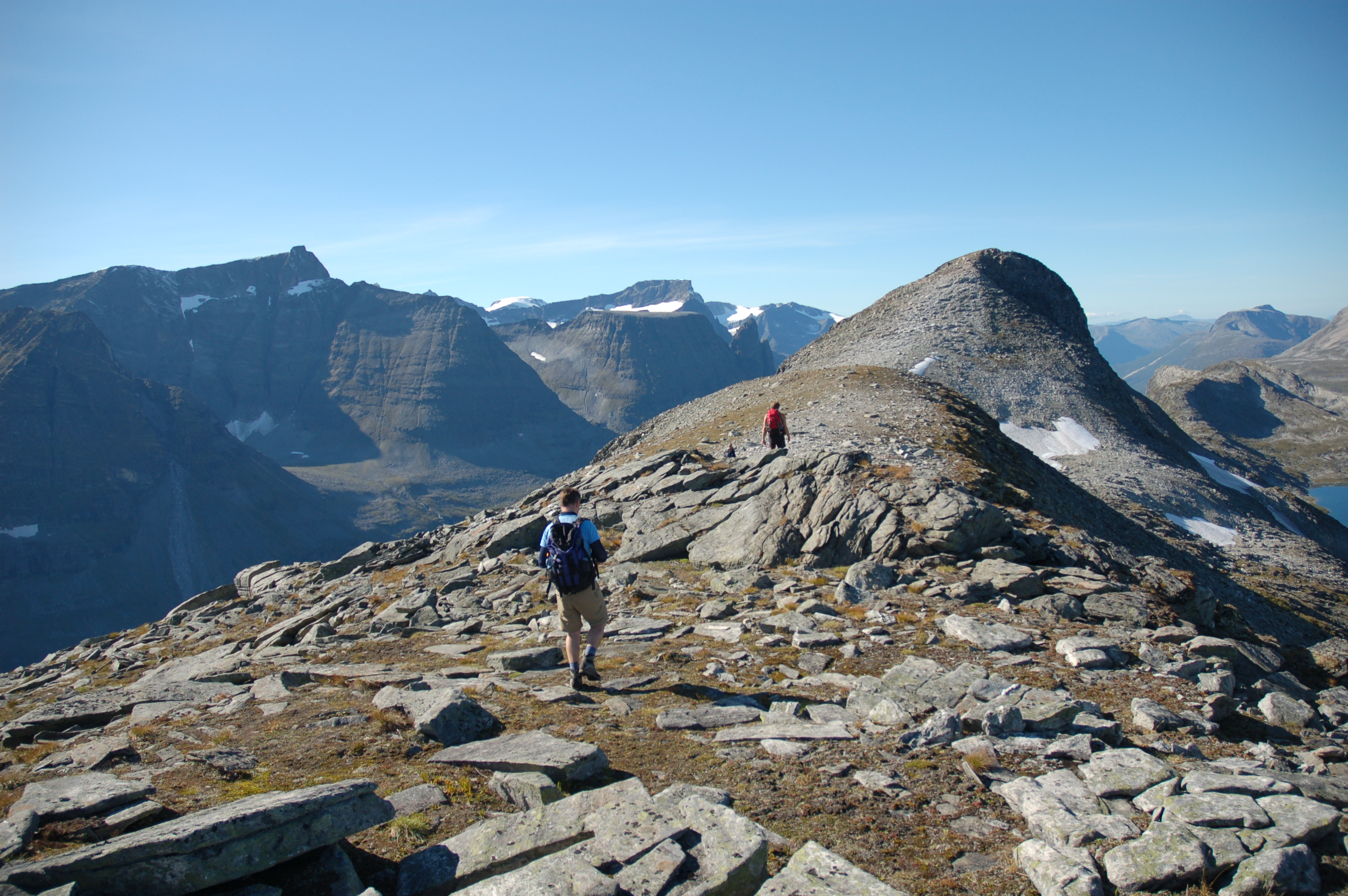 Ryggen og hovedtoppen av Kringlehøa.